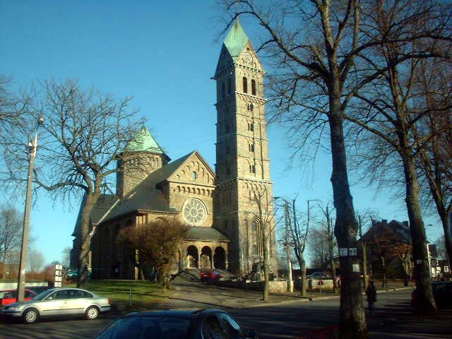 Eglise de Bütgenbach, vue de face